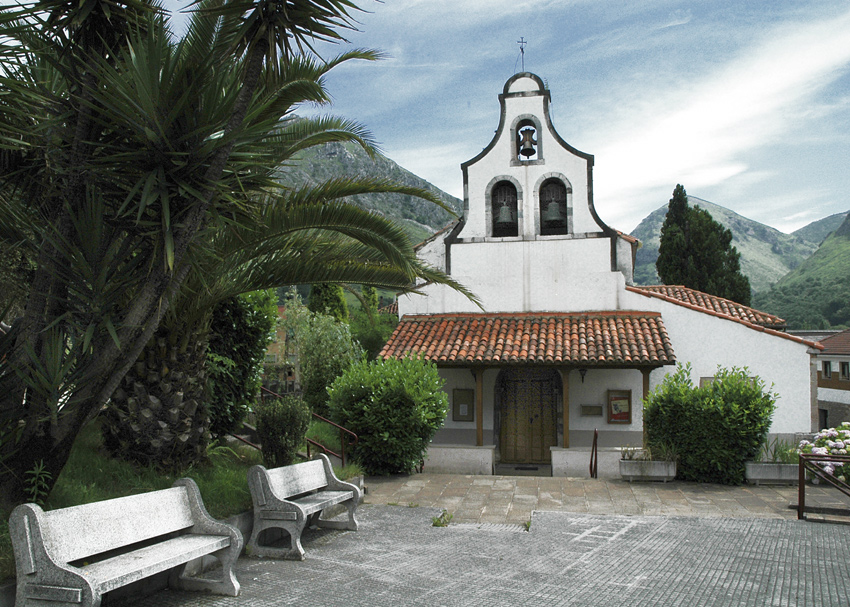 Iglesia de la parroquia de Santa Eulalia de Morcín. (Ref.0224-Santolaya)